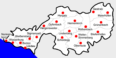 Karte: Landkreis Lindau (Skizze)